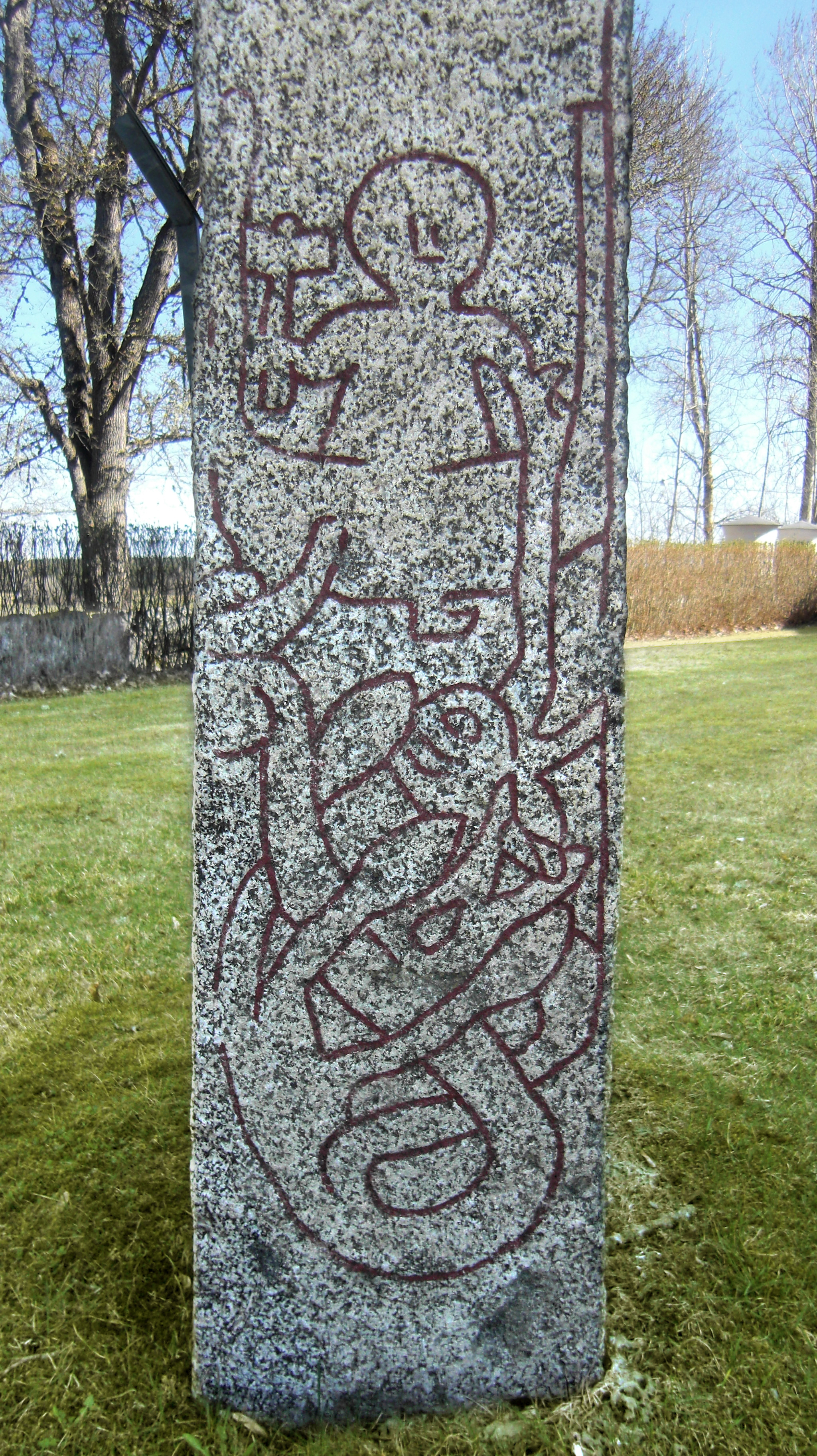 Altunastenen U 1161 (RAÄ-nr Altuna 42:1) vid Altuna kyrka, Altuna socken, Simtuna härad, Fjädrundaland, Enköpings kommun, Uppsala län, Uppland, Sverige. Här ses underdelen av runstenens vänstersida där Tors fiskafänge visas. Vi ser guden Tor med höjd hammare i en båt med ett oxhuvud på en rev och Midgårdormen som hugger på betet. Observera att Tor trampat igenom botten på båten.